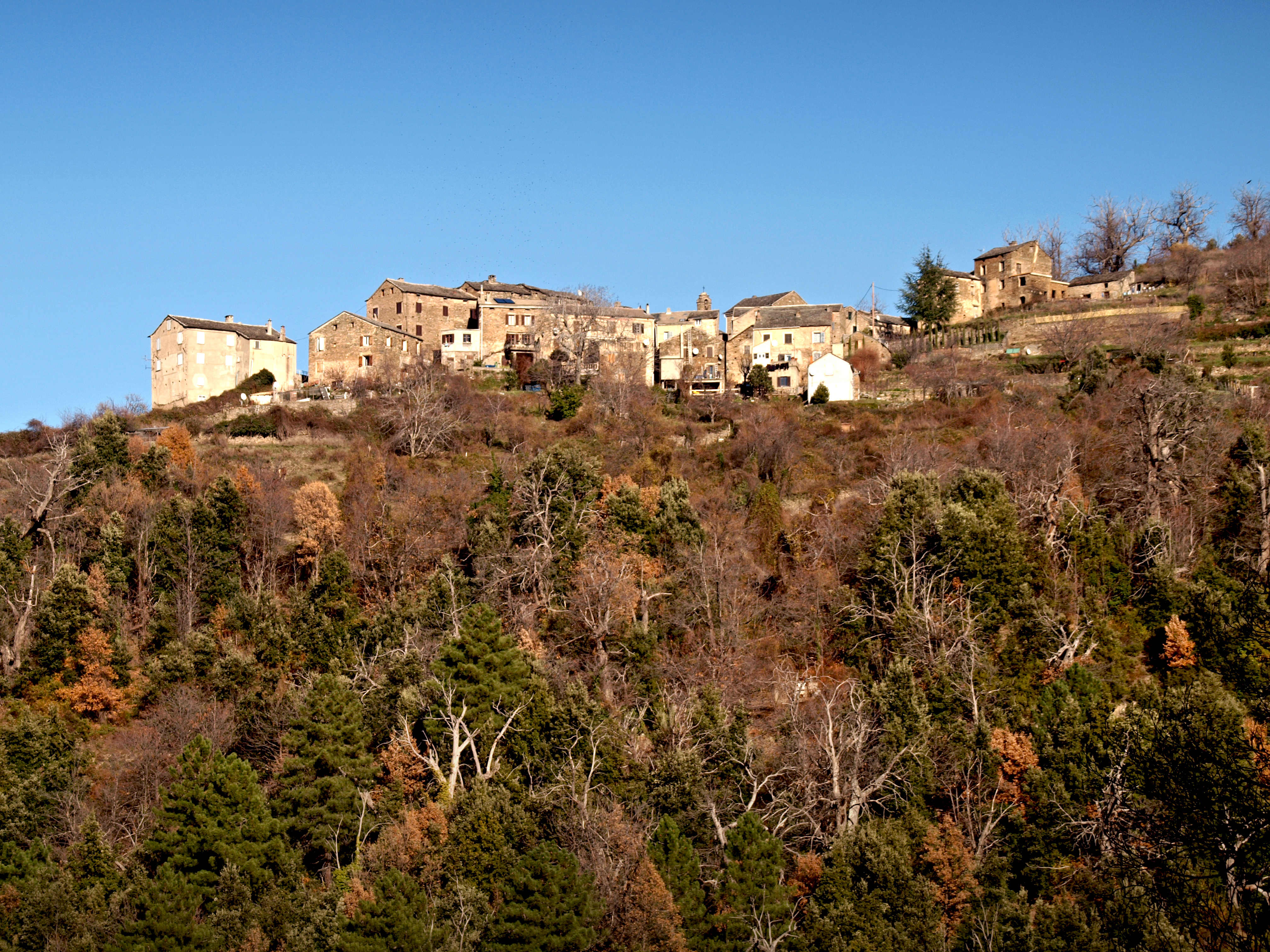 Castineta (Corsica) - Vue du village